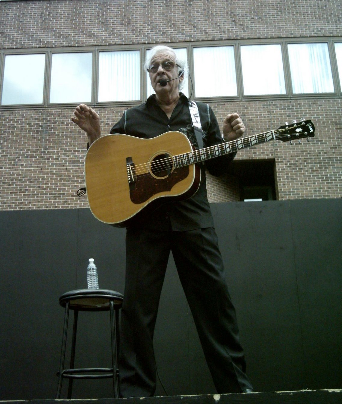 Jérôme Lemay fait sourire les gens avec une chanson humoristique lors du Festival Juste pour rire à Montréal